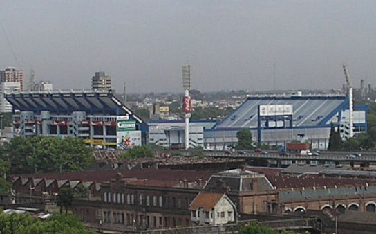 Estadio José Amalfitani, Club Atlético Vélez Sarsfield, Ciudad de Buenos Aires, Argentina